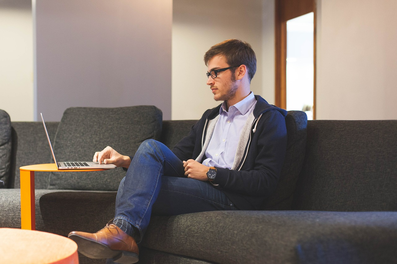 Sófa-aktívismi er aktívismi sem hægt er að stunda úr sófanum heima hjá sér. e. slacktivism